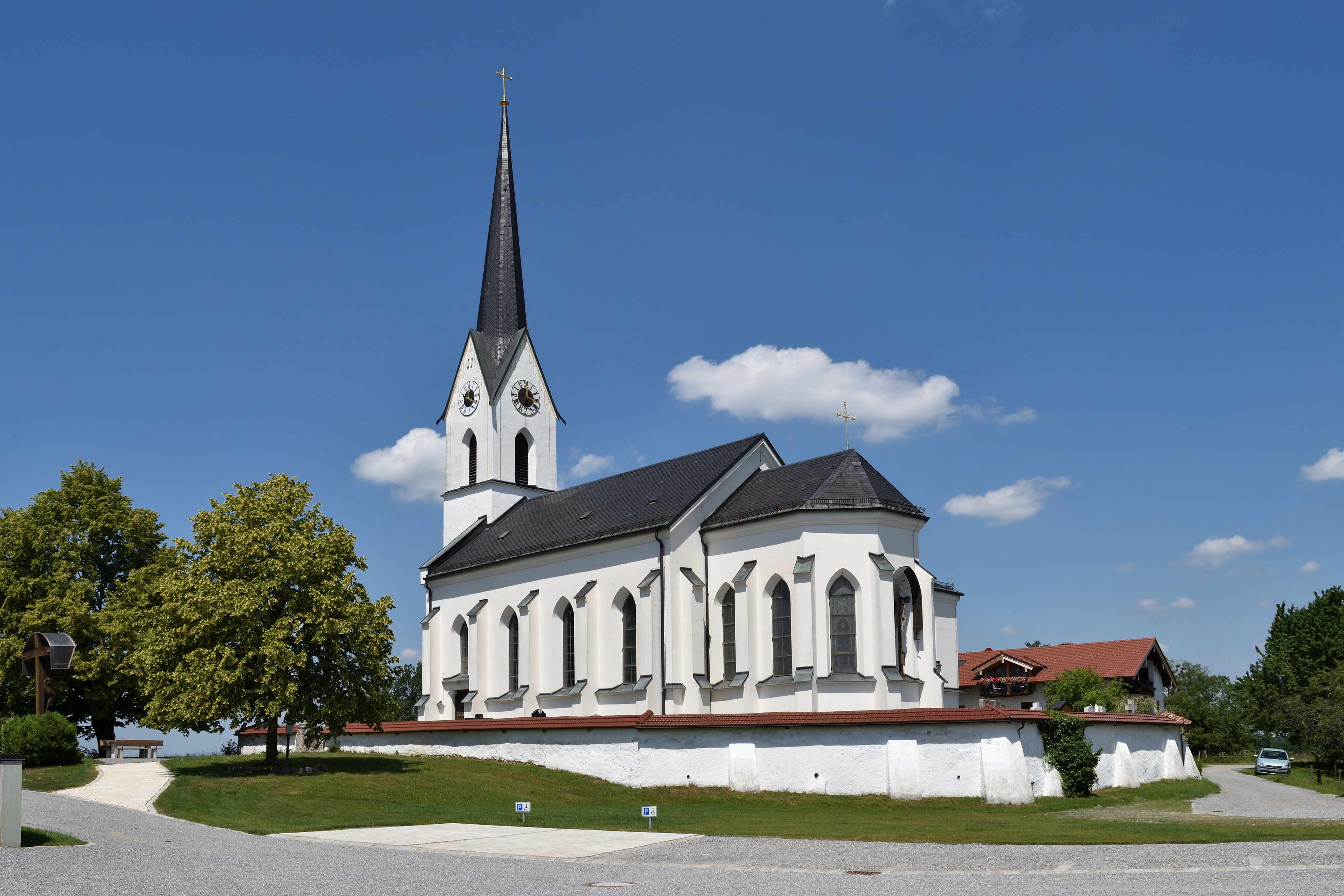 LK Rosenheim - Pietzenkirchen - St. Stephanus und St. Laurentius - Juni 2018This is a photograph of an architectural monument.